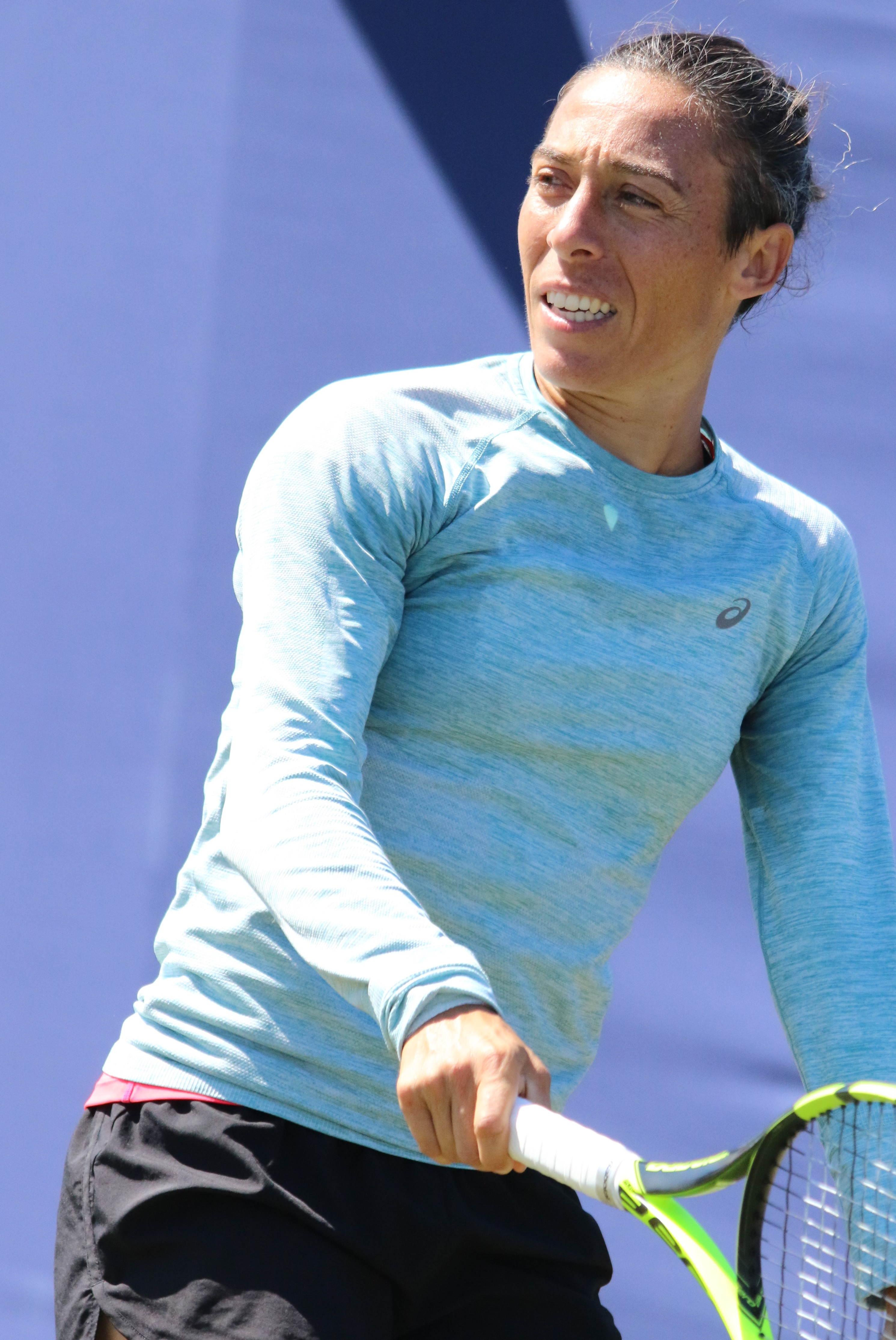 Schiavone EBN17 (4)